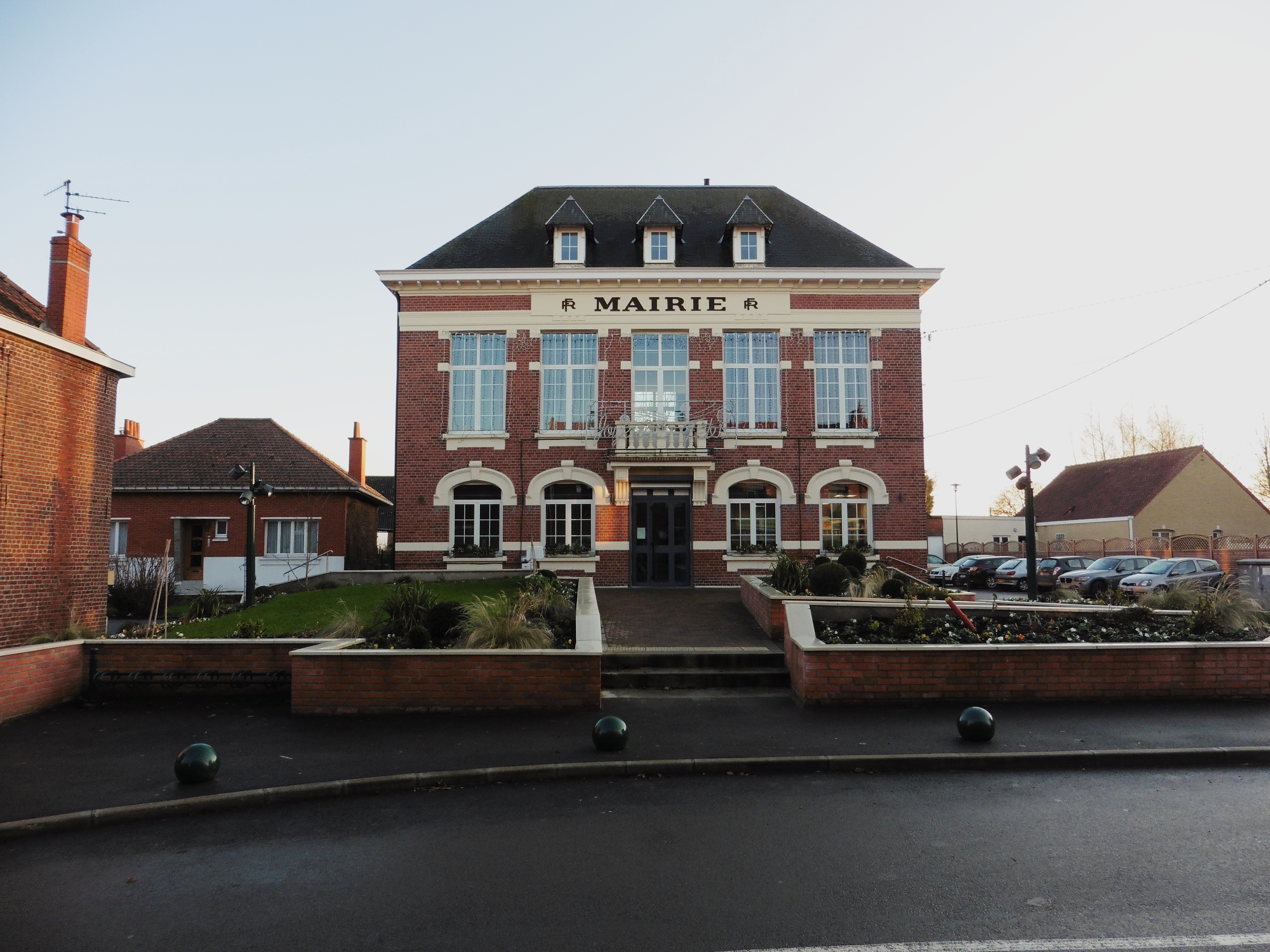 La mairie Aubers dans le Nord Nord-Pas-de-Calais.- France.